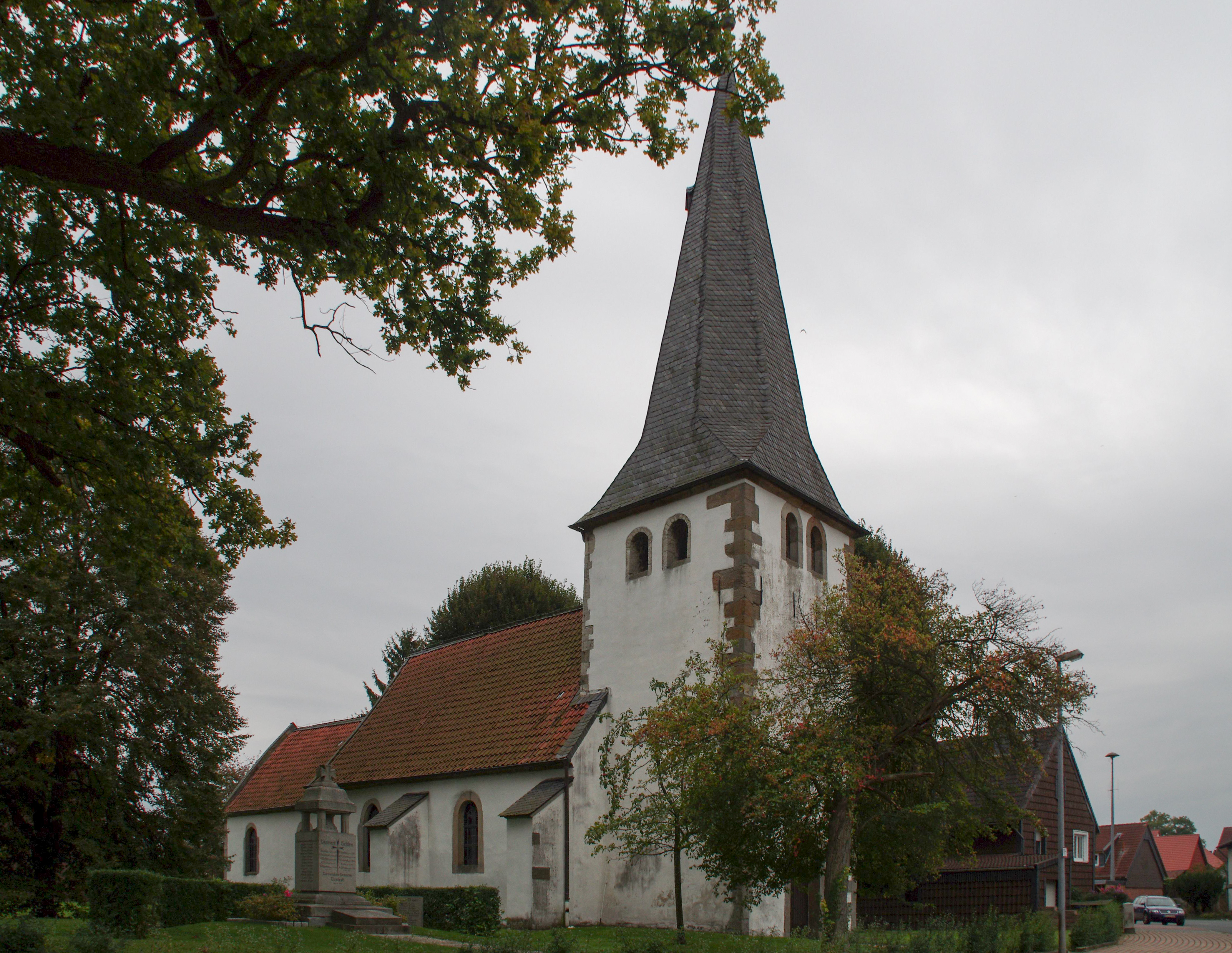 Elbe in Niedersachsen. Der Ort befindet sich im Landkreis Wolfenbüttel.